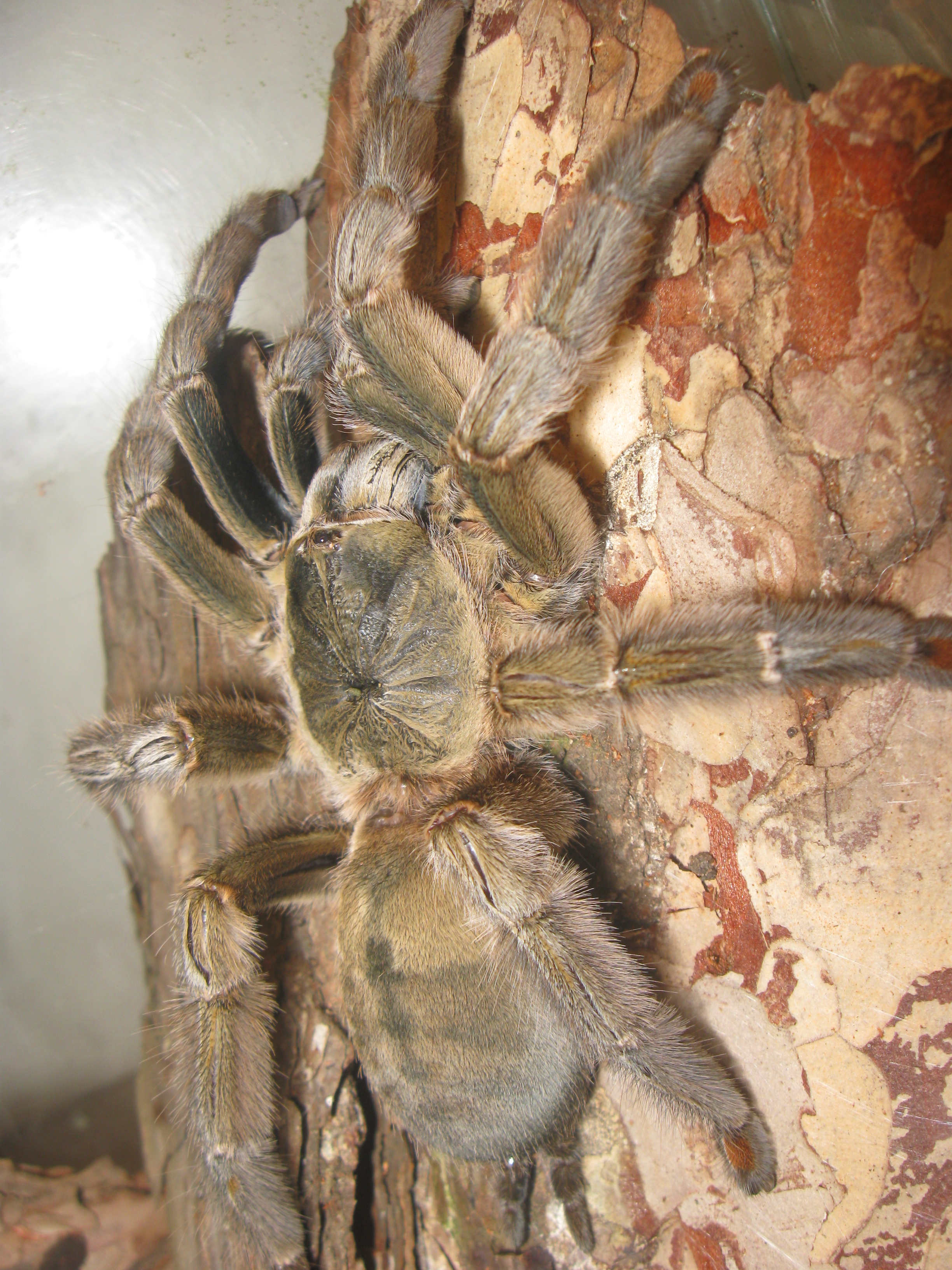 Psalmopoeus cambridgei adult ♀